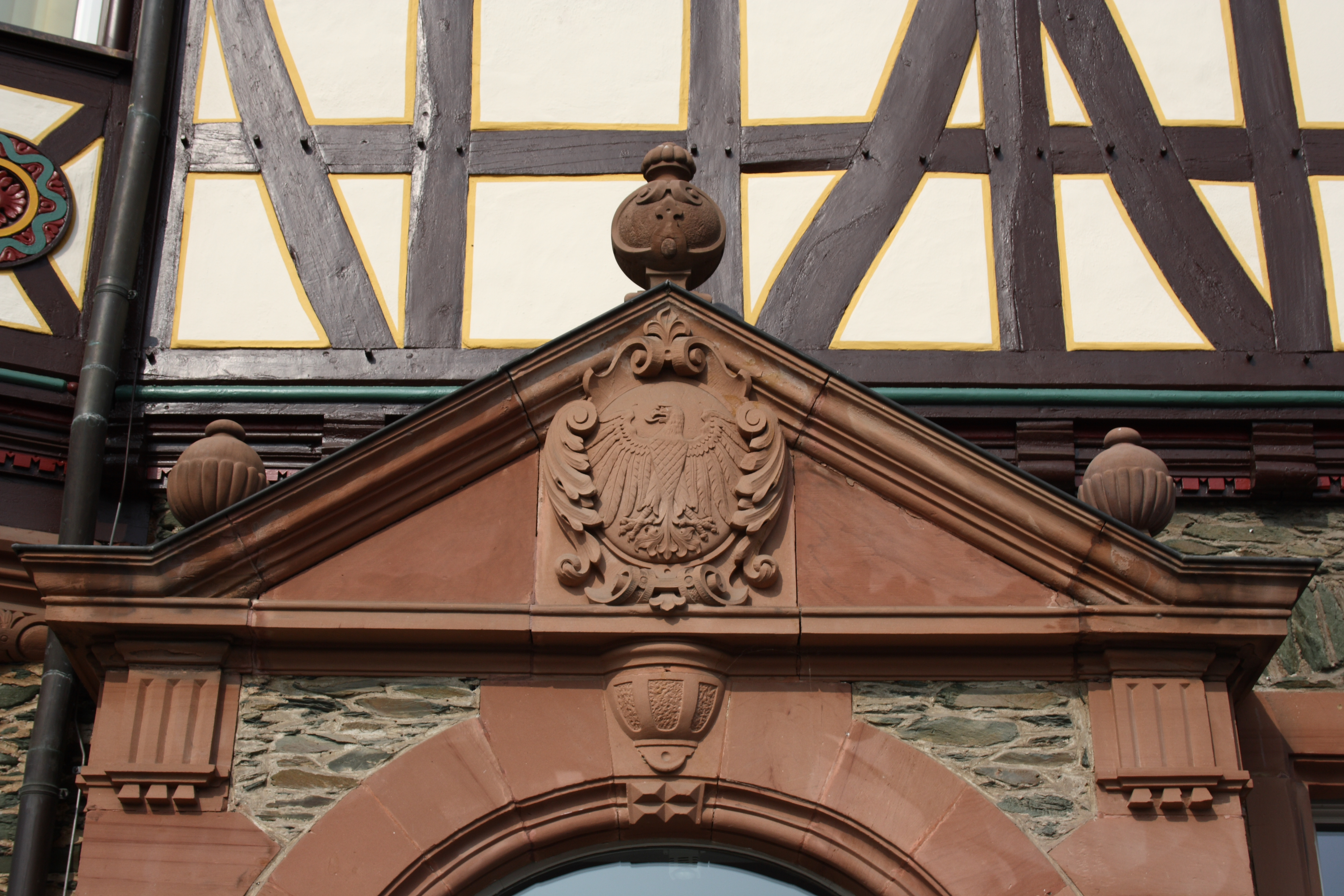 ehemaliges Postamt in Braunfels im Lahn-Dill-Kreis (Hessen), Am Kurpark 11